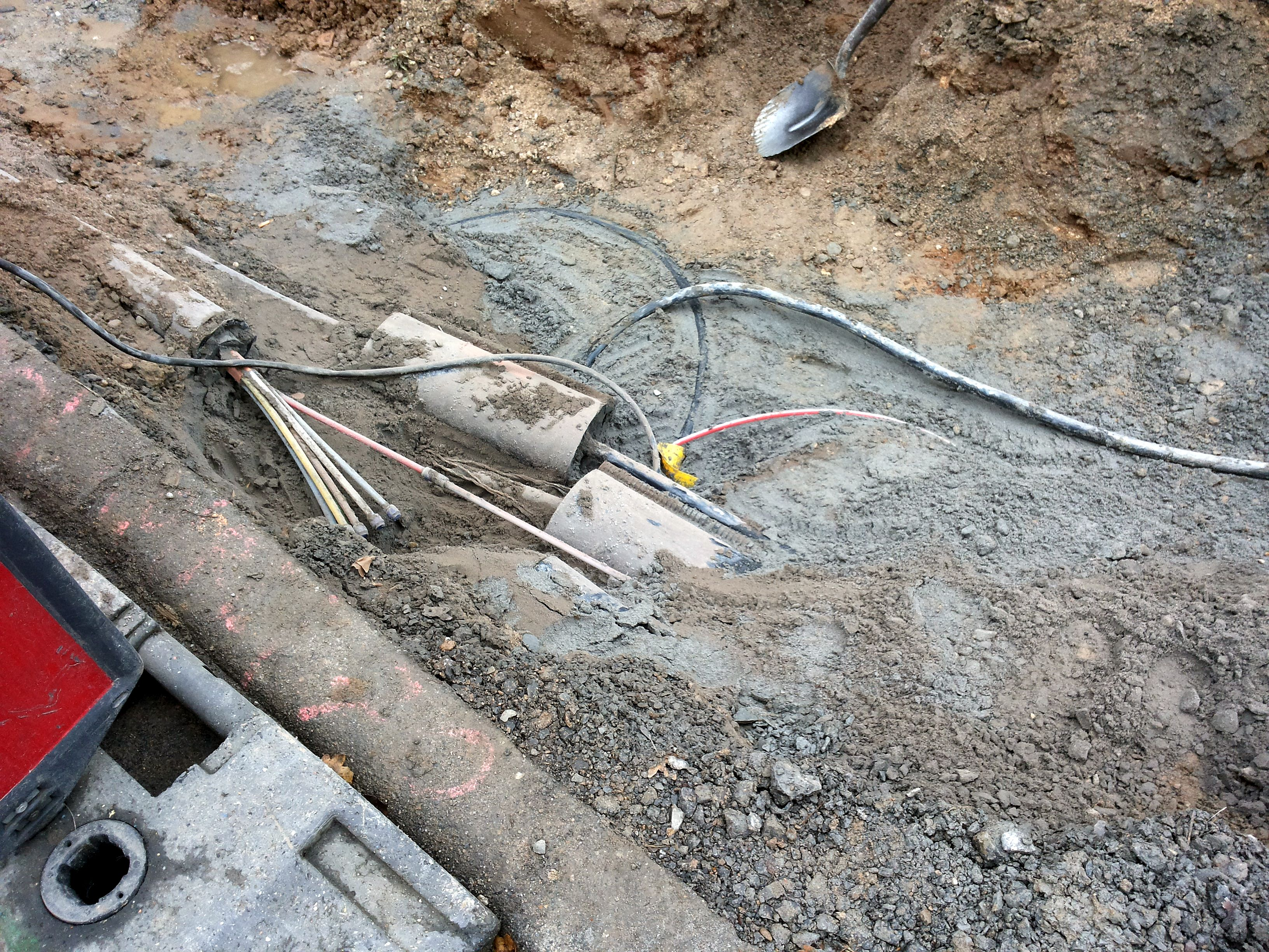 Verlegte Glasfaserkabeln in einem Dorf.